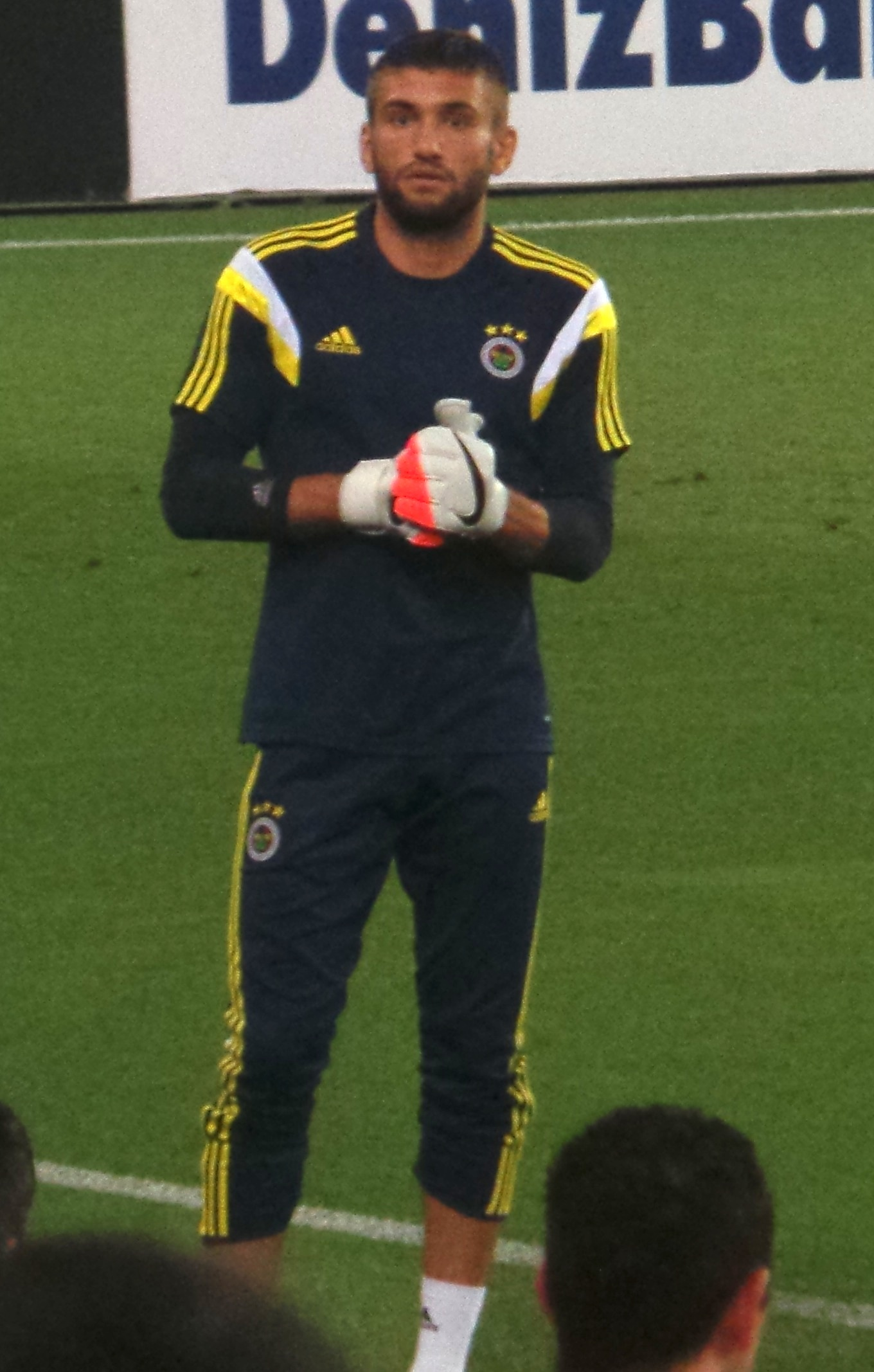 Ertuğrul Taşkıran 14-15